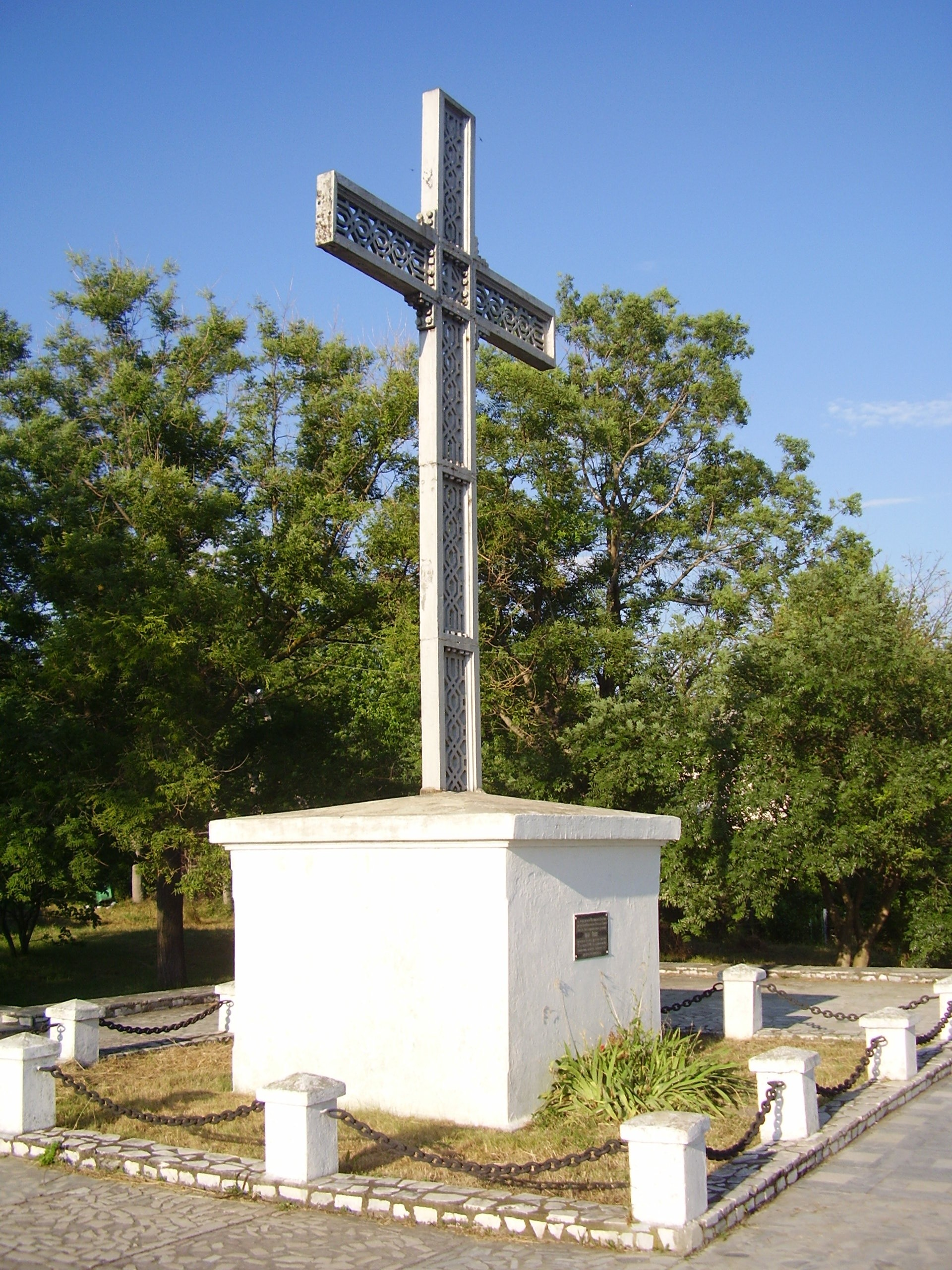 Архипо-Осиповка. Памятник Архипу Осипову.